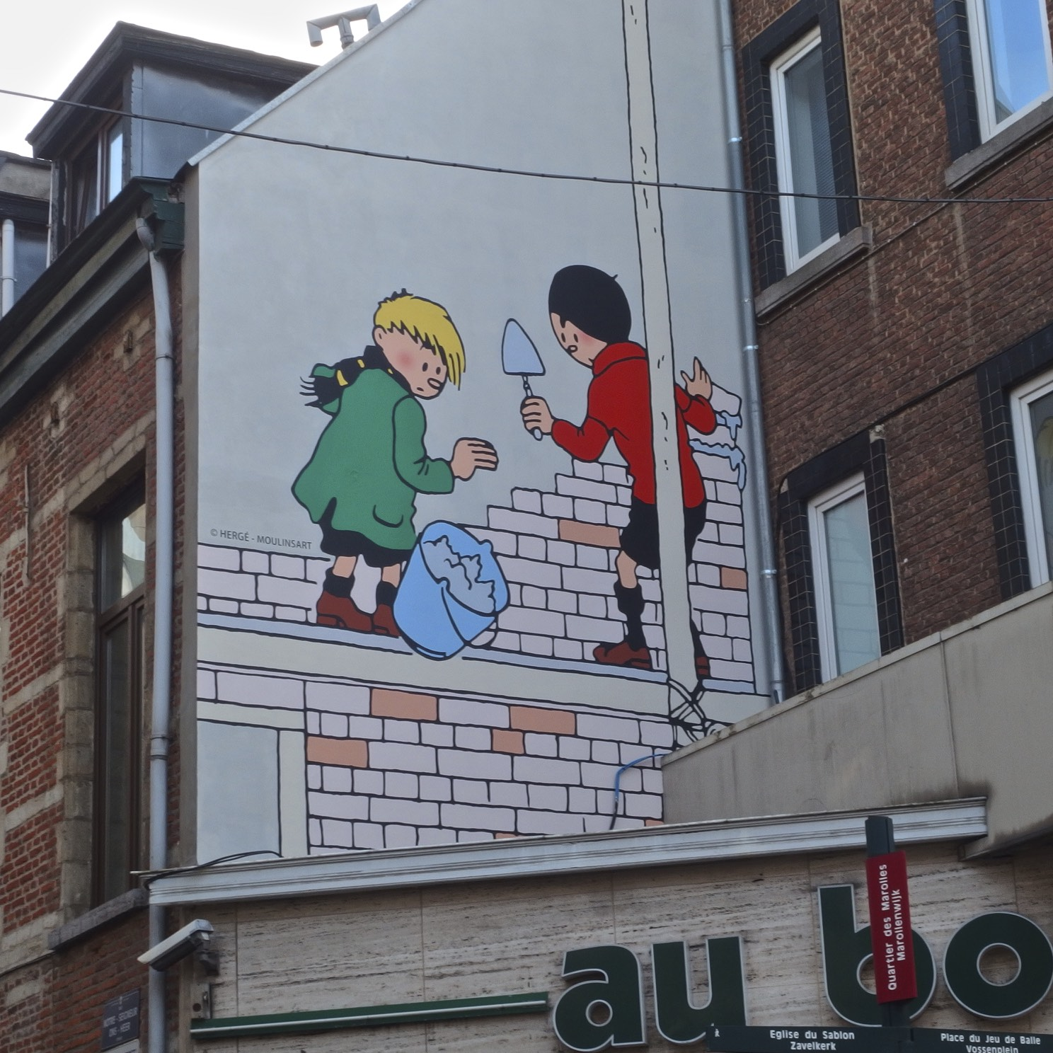 Nieuwe stripmuur Quick en Flupke te Brussel